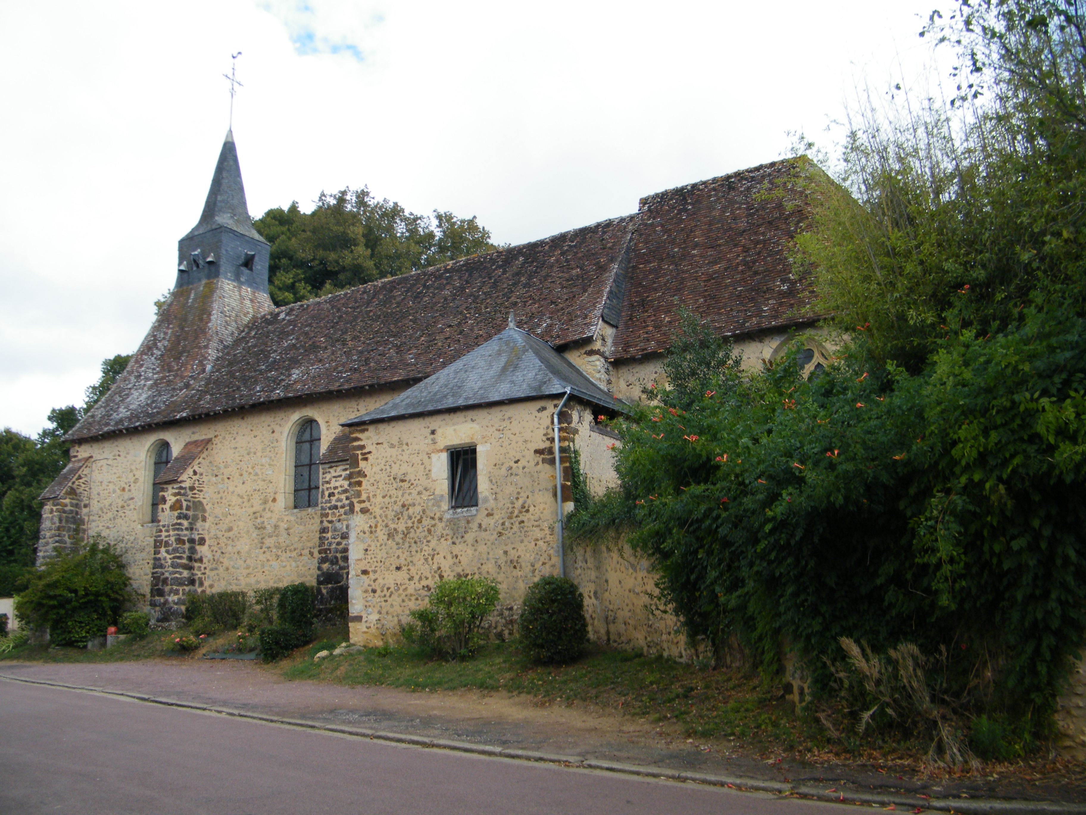 Le Plessis-Dorin, Loir et Cher, Fr, église (8)